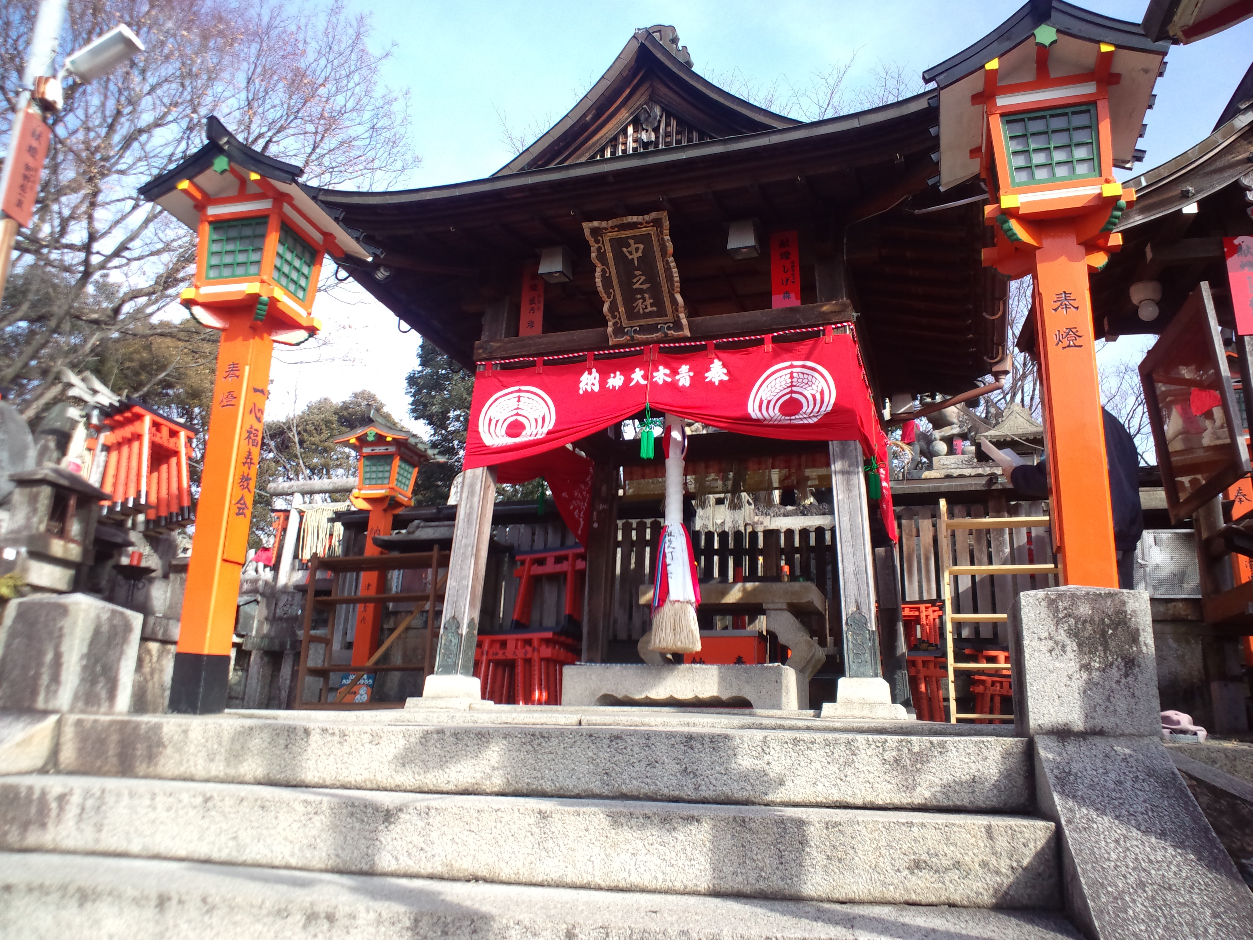 伏見稲荷大社 中之社